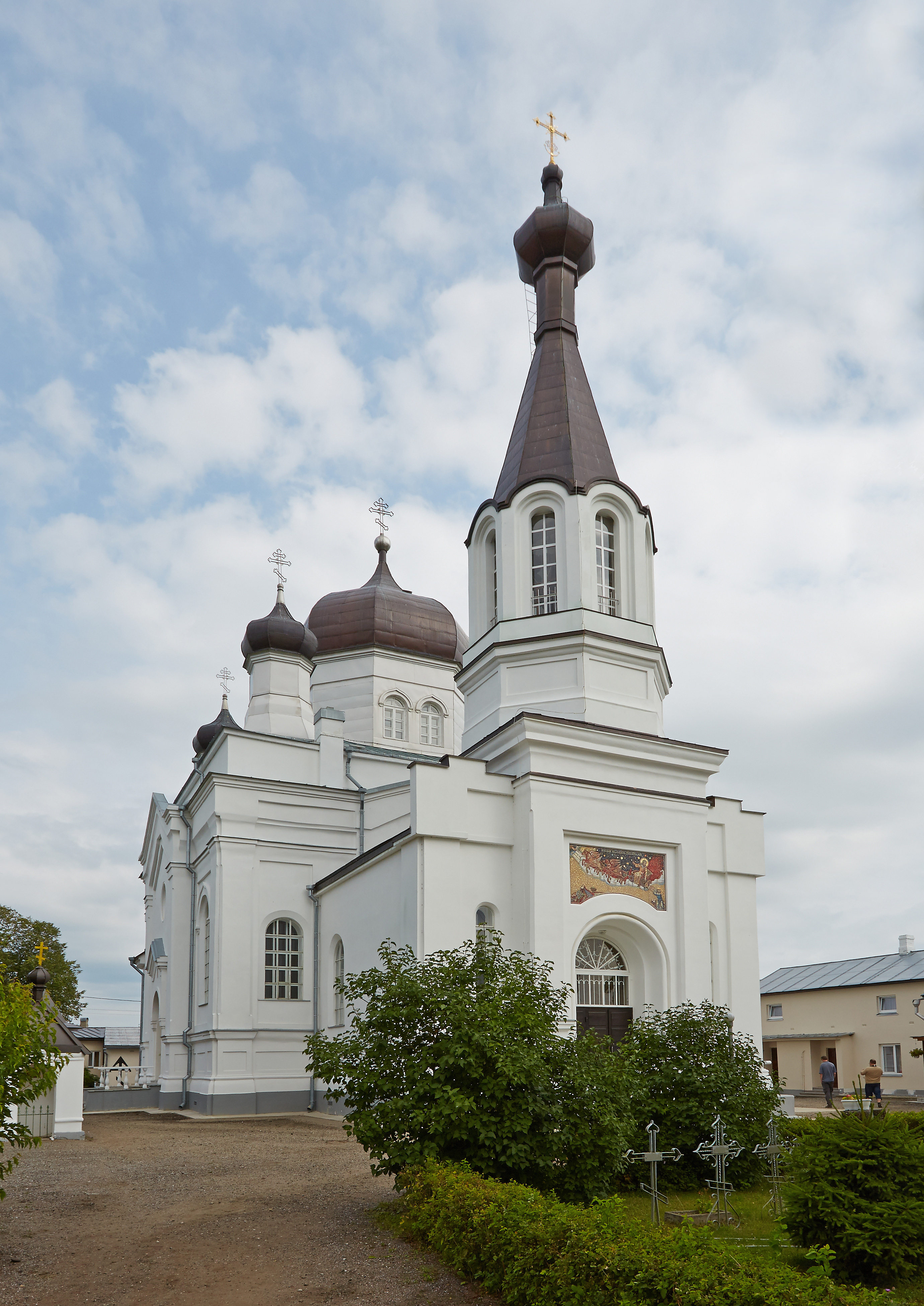 Prohvet Eeliase kirik Vasknarva kloostris